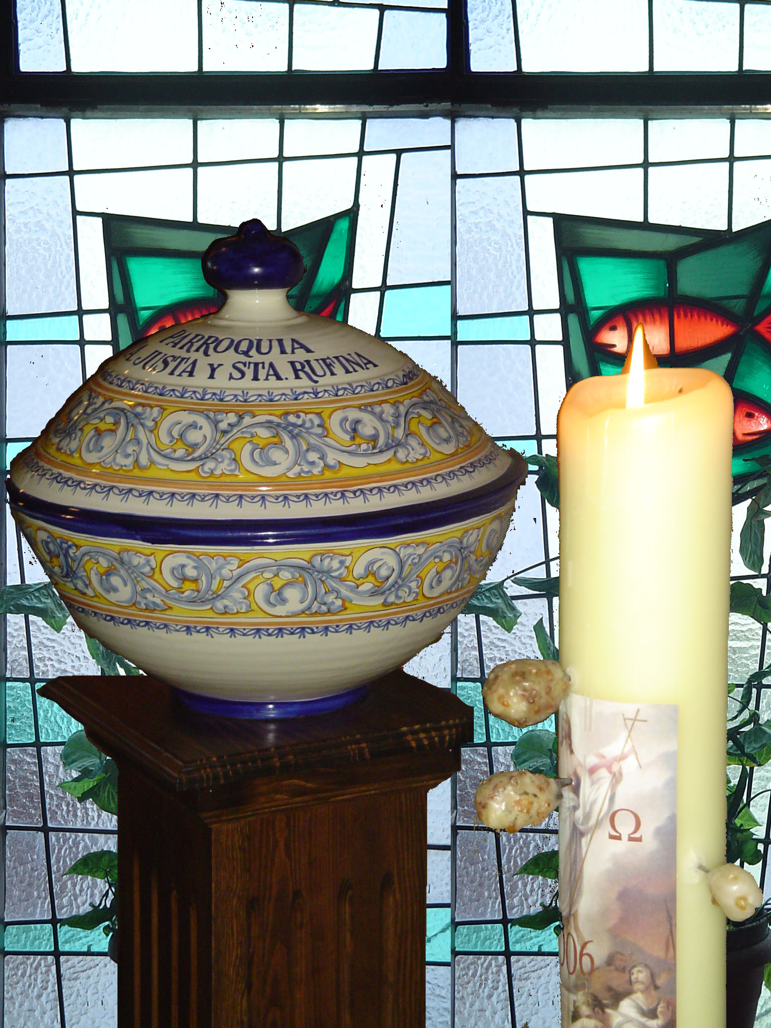 Cirio pascual y la santa pila Bautismal